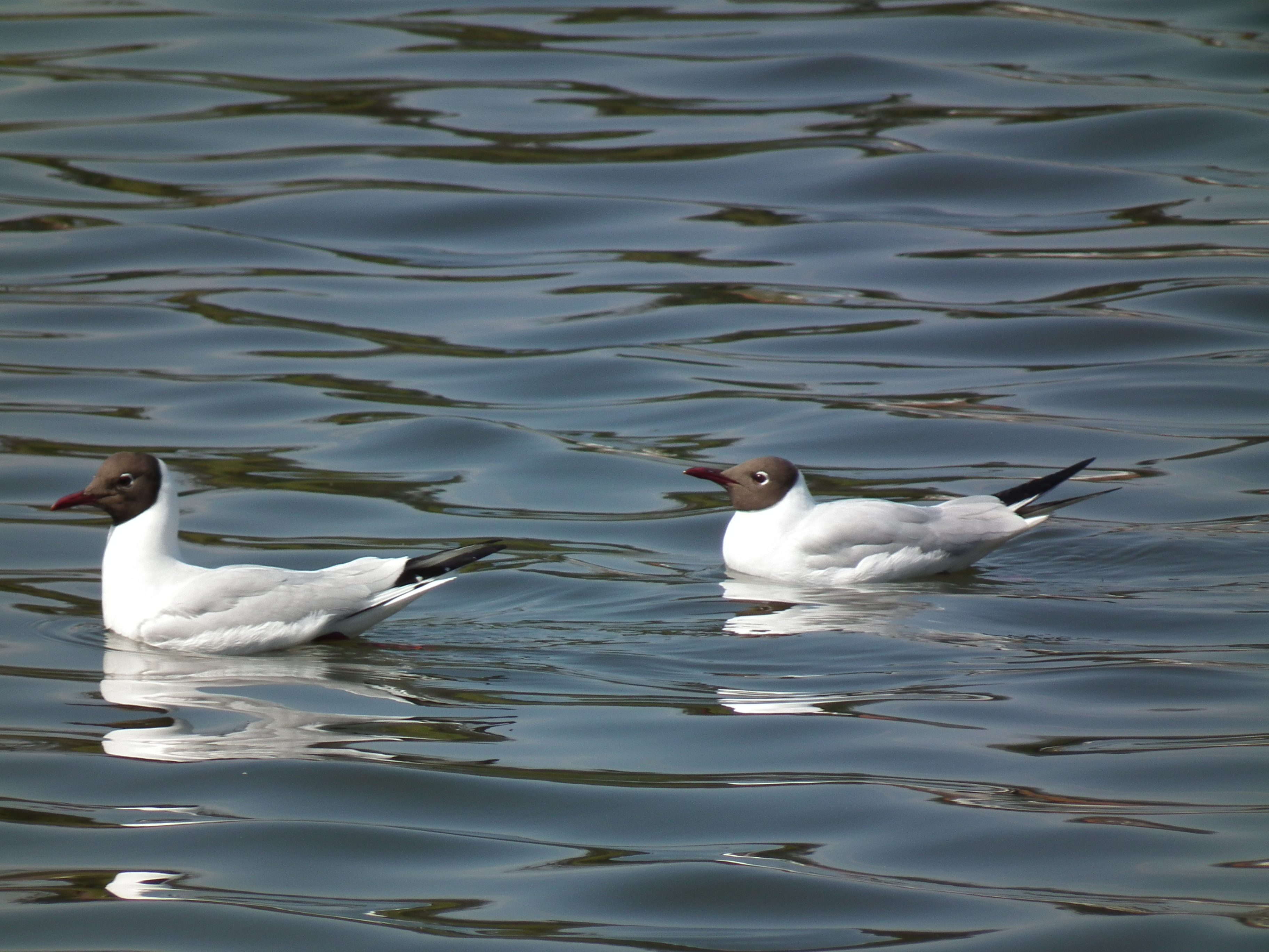 Schwimmende Lachmöwen (Larus ridibundus) im Prachtkleid